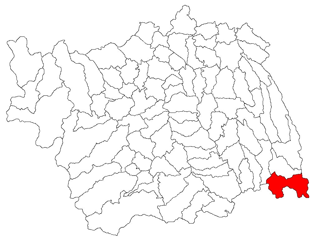 Categorie:Hărţi ale judeţului Bacău